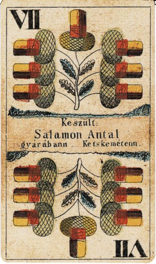 Salamon Antal kártyakészítő makk hetese, aki az 1850-es években magyar kártyákat készített kecskeméti műhelyében.